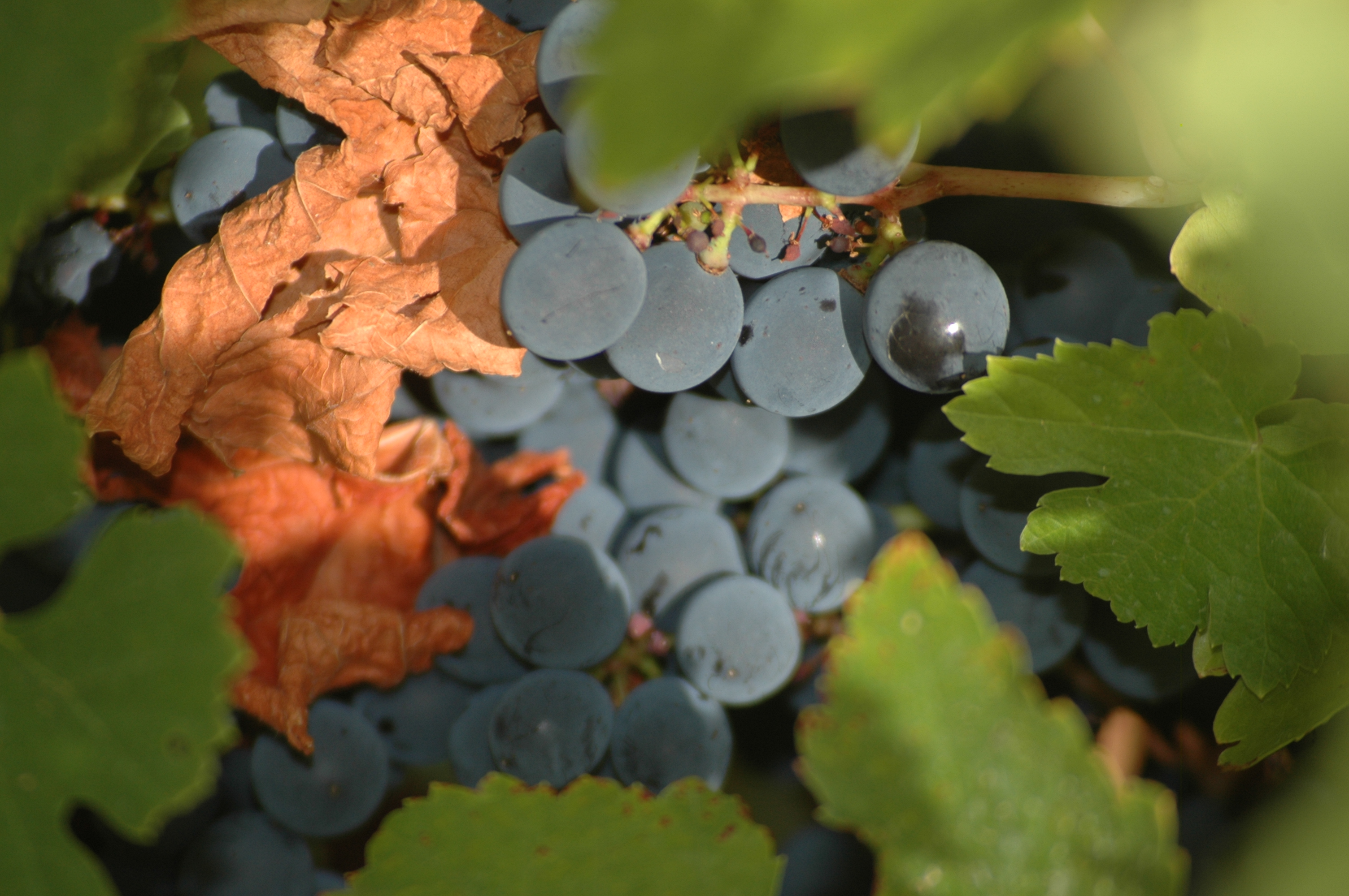 Uva Mencia en época de vendimia en El Bierzo, León, España.